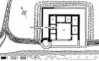 Karl von Löwis of Menari poolt XX sajandi algul mõõdistatud Salaspilsi (Neu-Kirchholm) linnuse plaan.